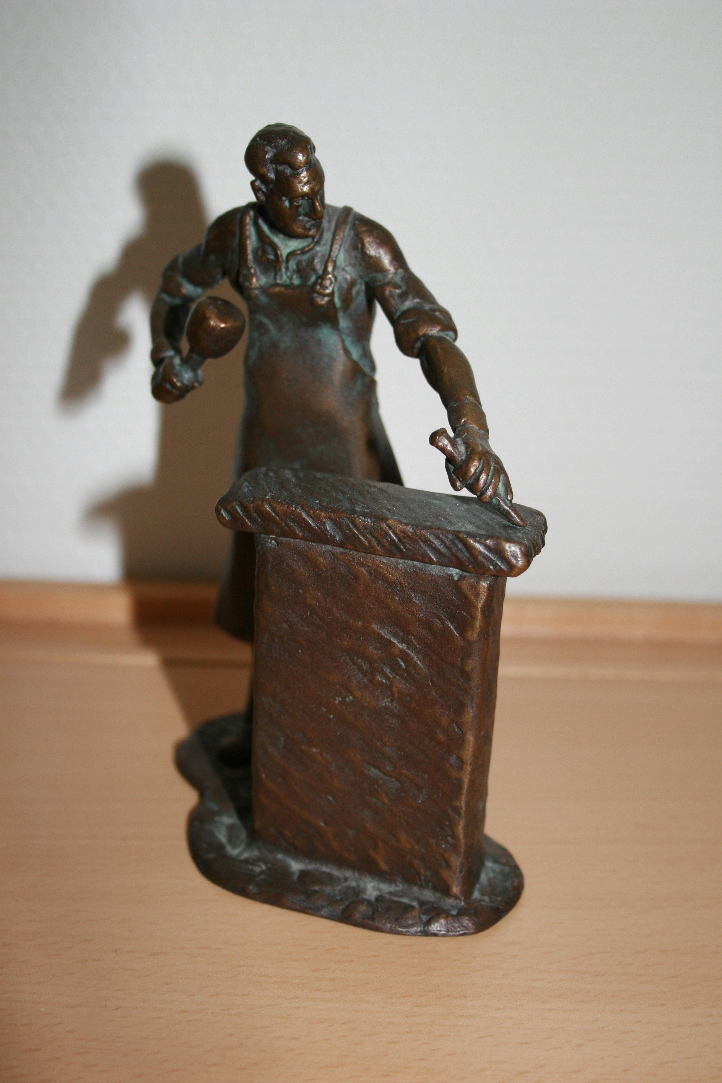 Haustein